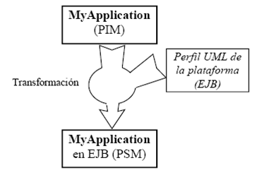 MDA-k proposatzen duen lan egiteko era